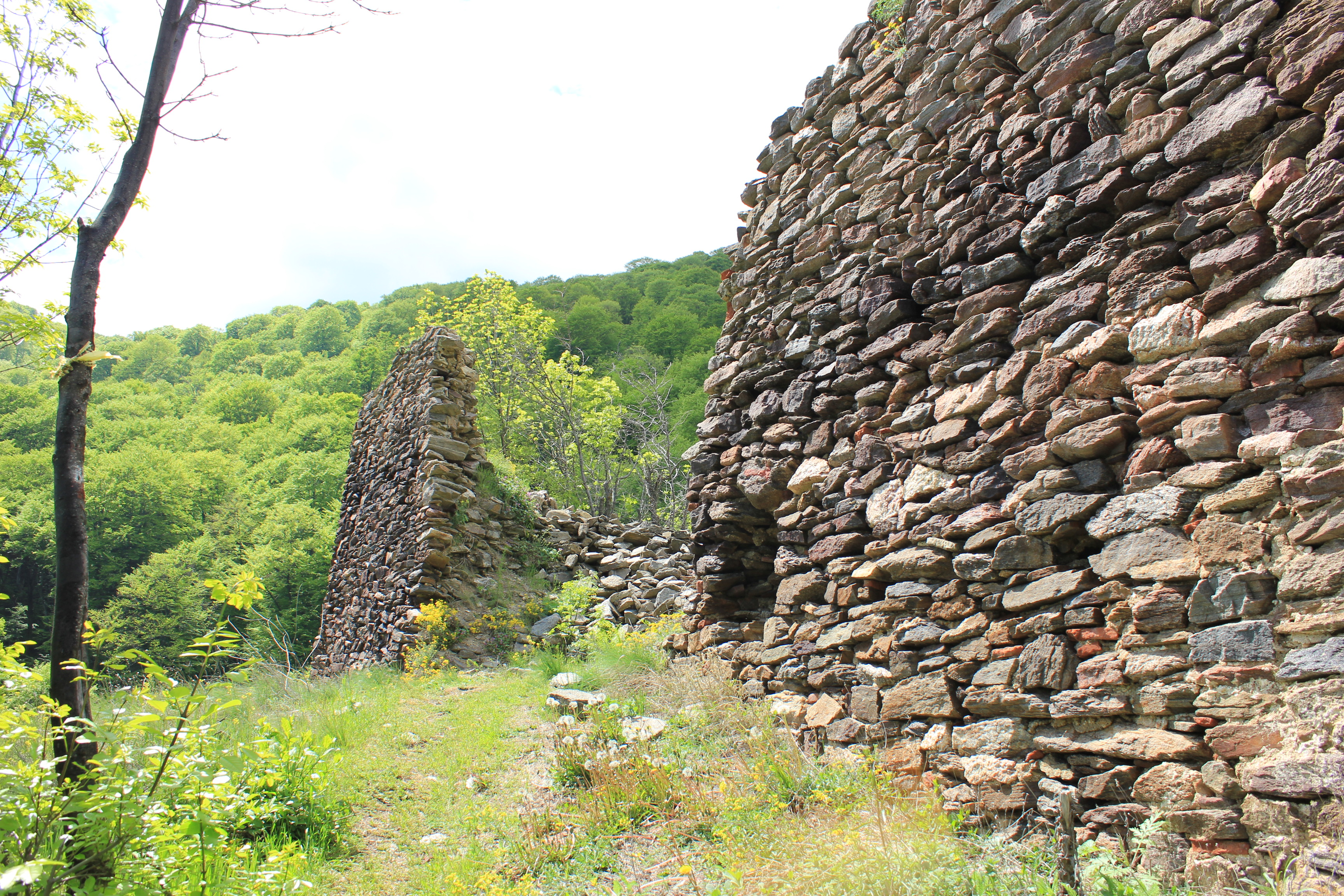 Южната стена на крепостта Марково кале, Враня, Сърбия.